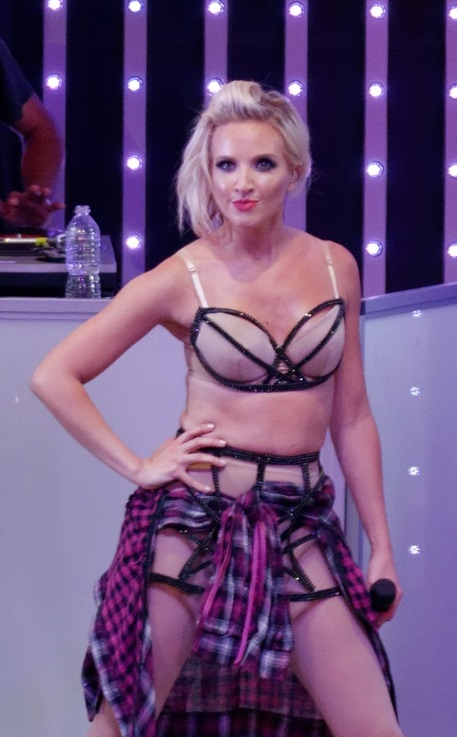 No Filter Tour